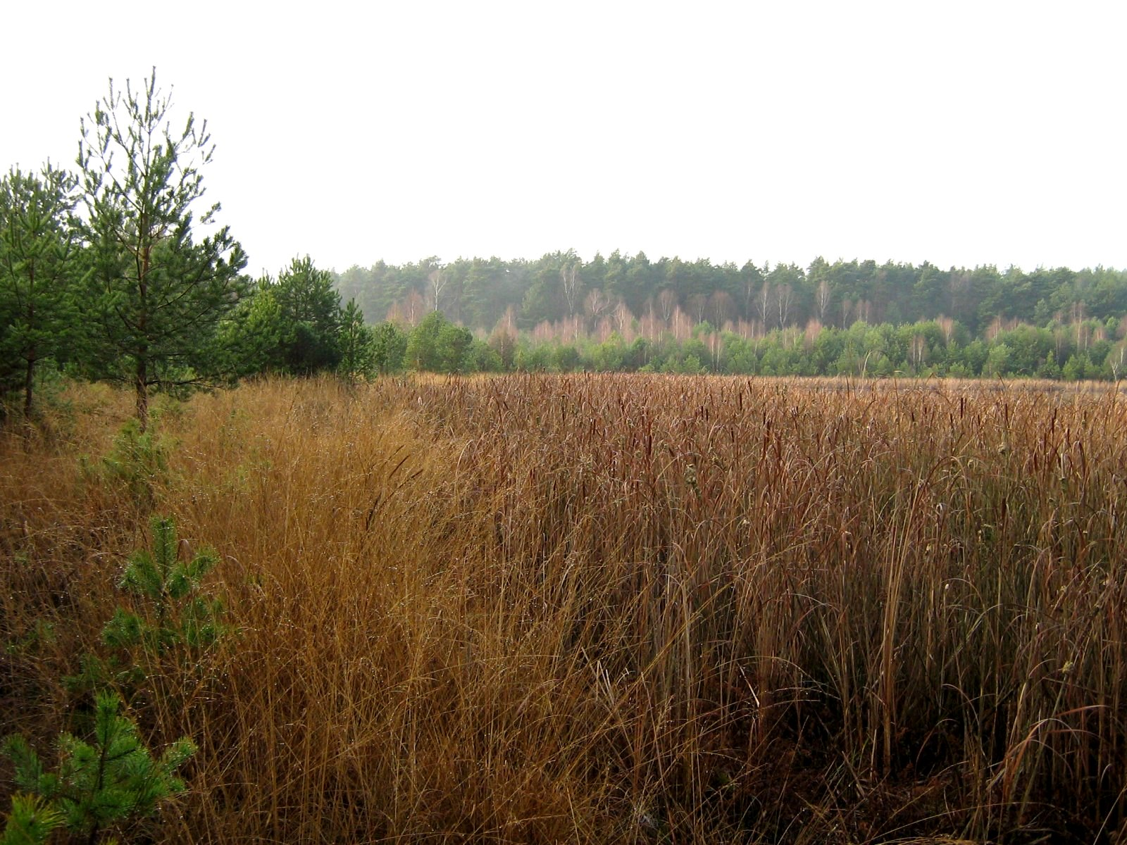 Foto des 7 ha großen Luchsees, des Kolks des gleichnamigen Kesselmoores in den Krausnicker Bergen im „Landkreis Dahme Spreewald“ in „Brandenburg“, „Deutschland“